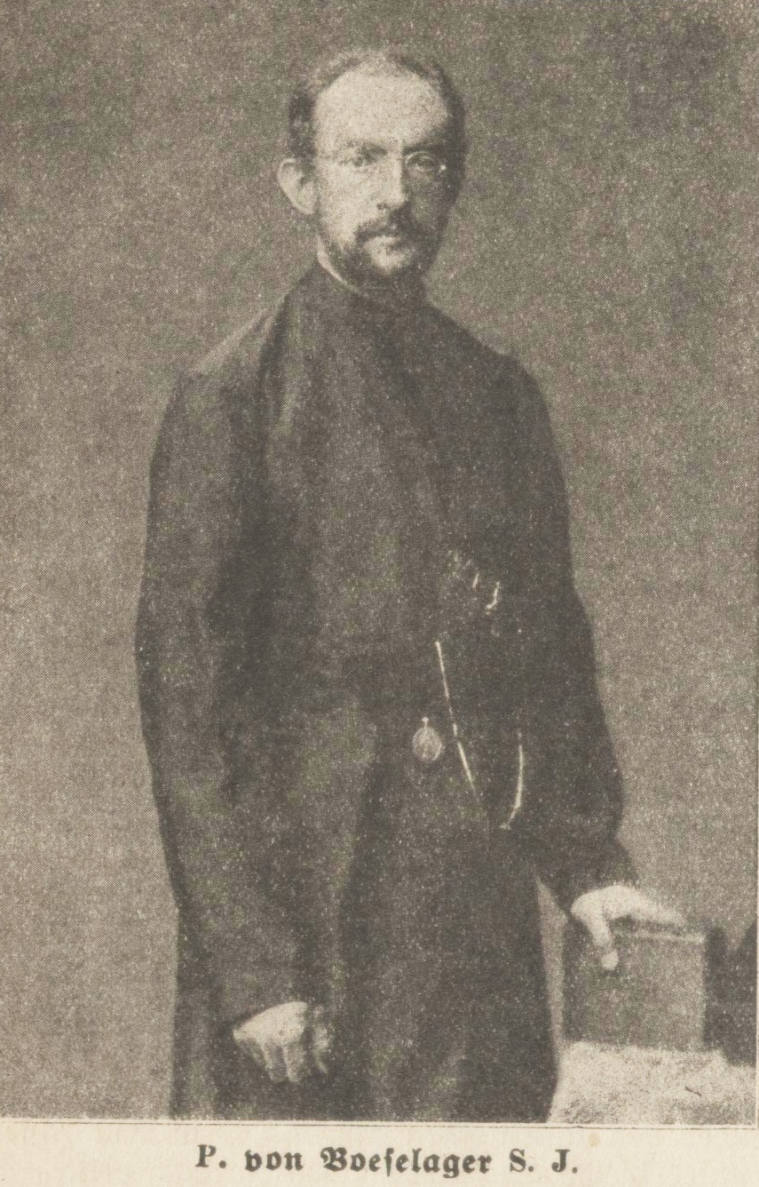 Pater Karl Frieherr von Böselager S.J., Professor in Bombay